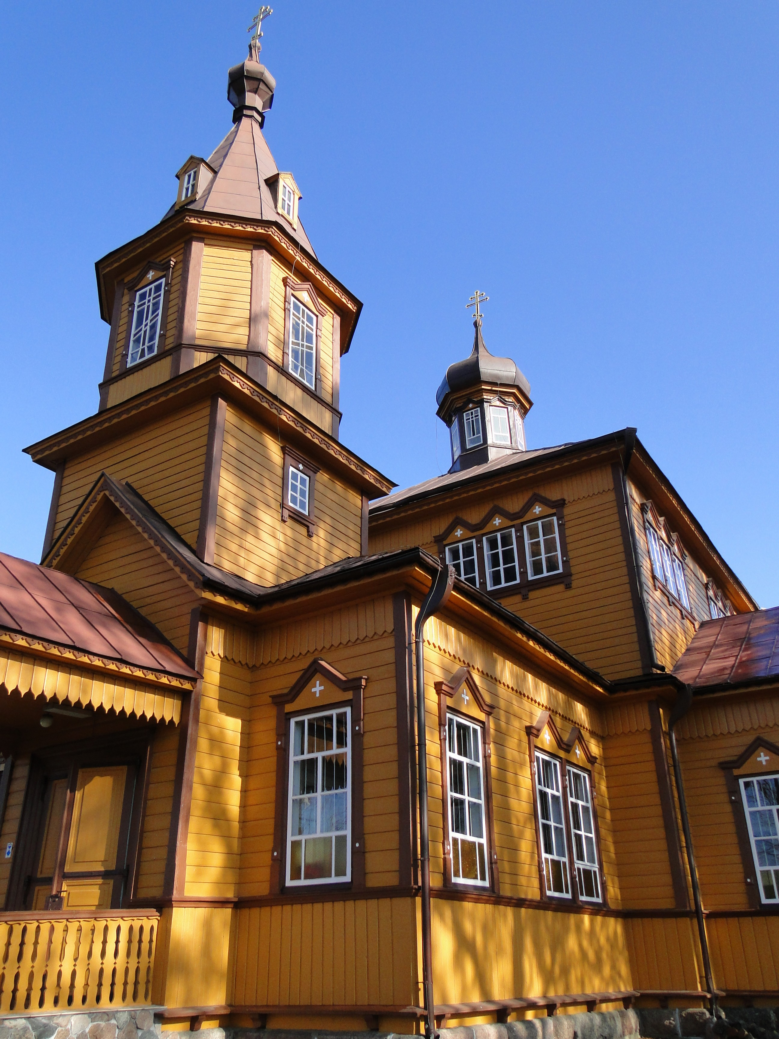 Juszkowy Gród, cerkiew prawosławna par. p.w. Narodzenia NMP, 1912